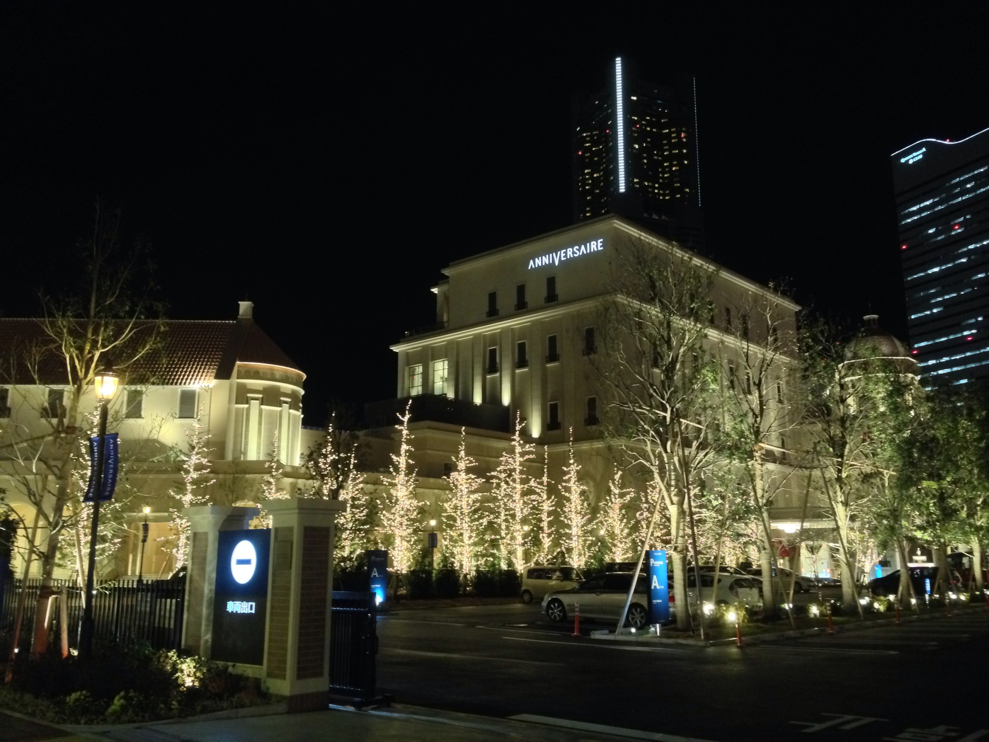 アニヴェルセル みなとみらい横浜の外観。